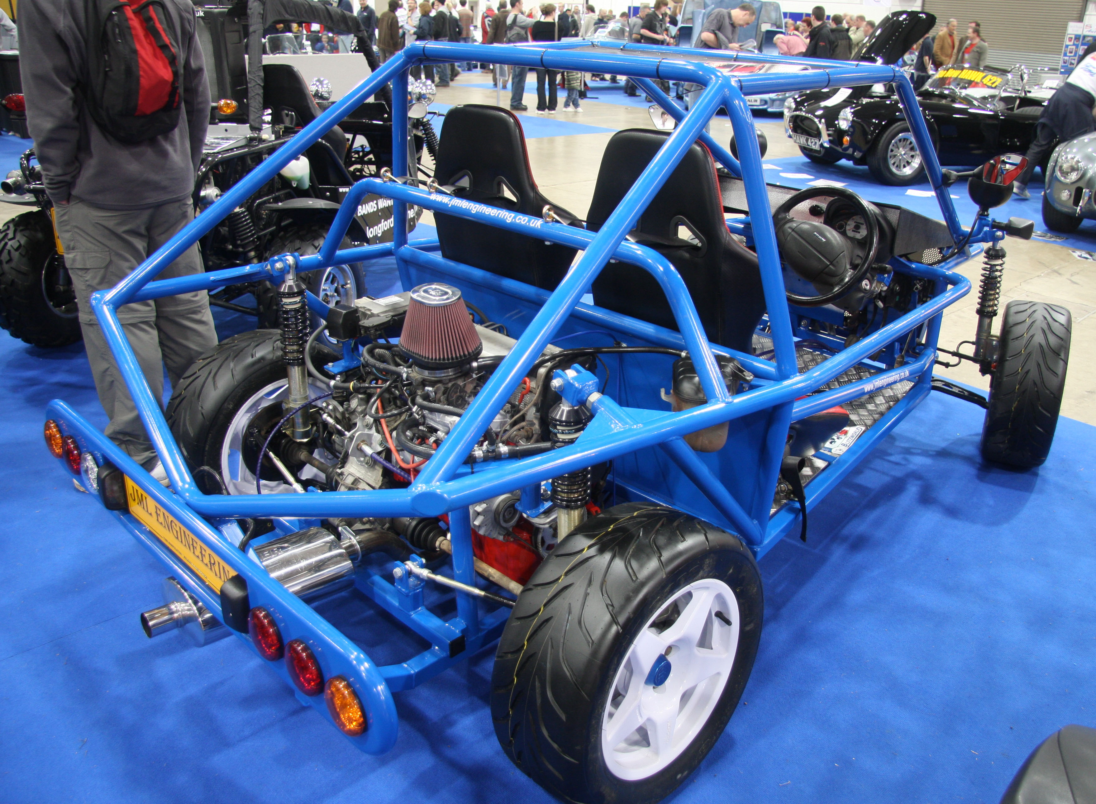 Blitzworld Howie buggy